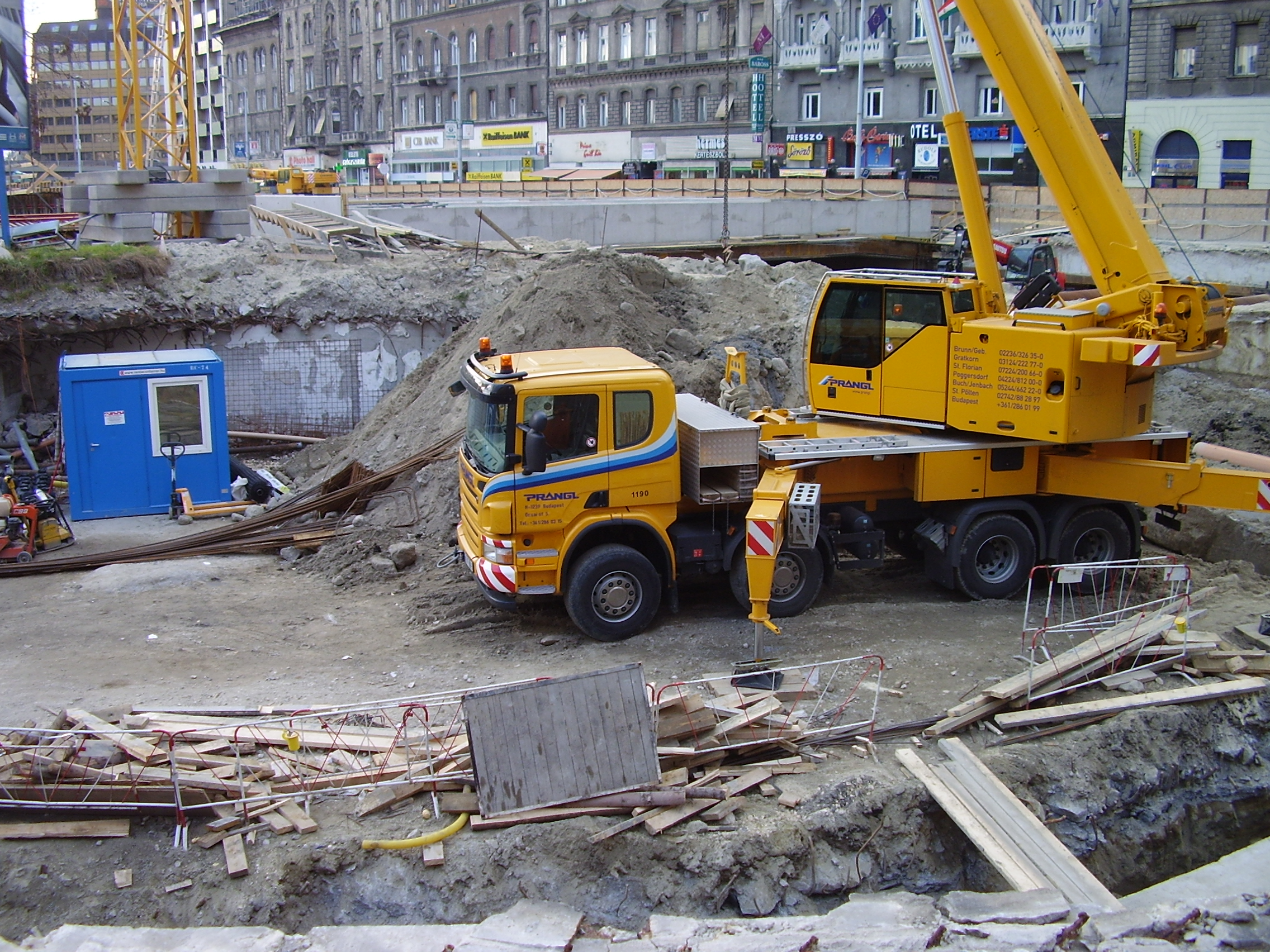 Metro 4 under construction, Budapest